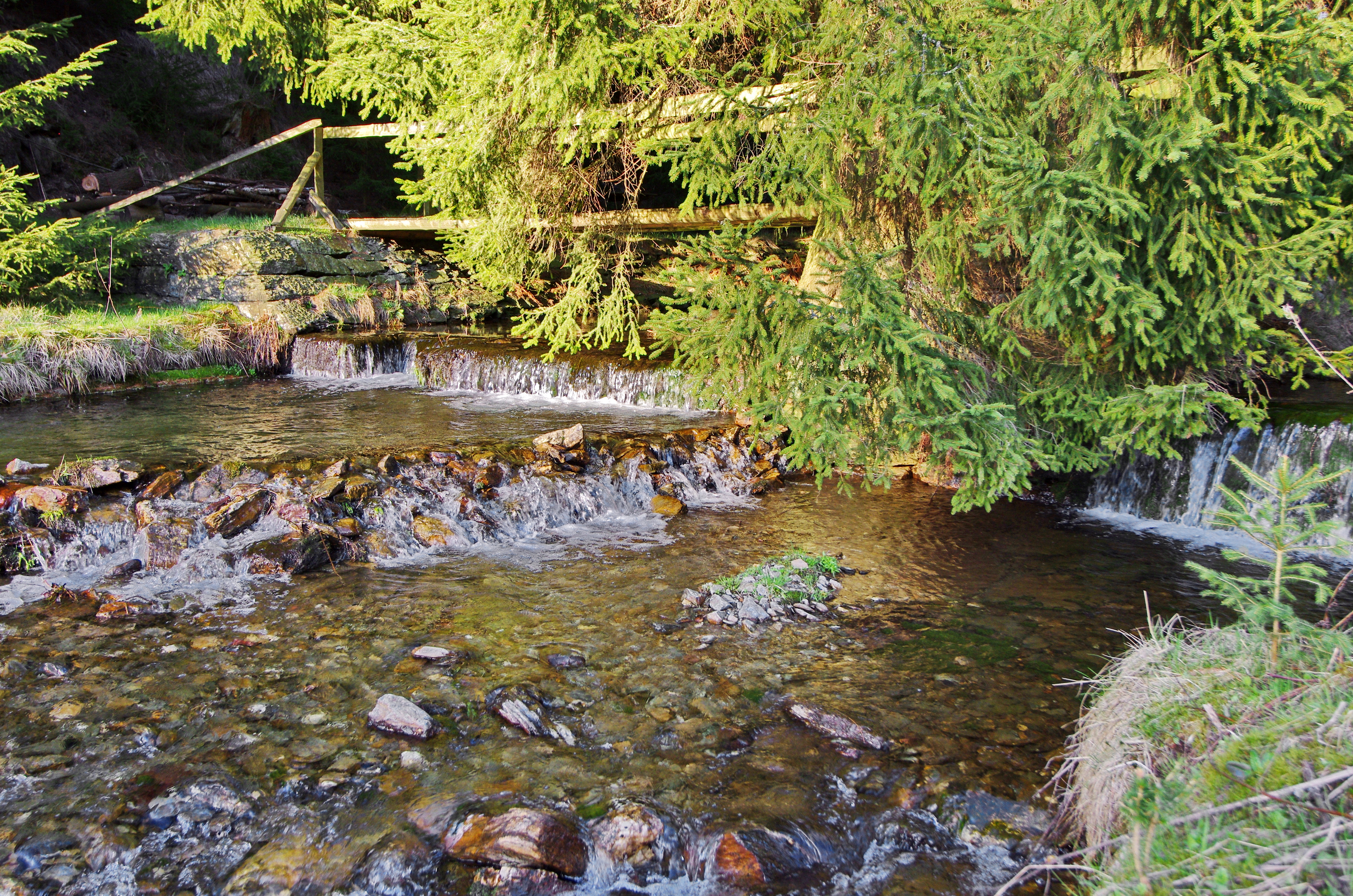 Zlatý potok v osadě Zlatý Kopec (část obce Boží Dar), Krušné hory, okres Karlovy Vary